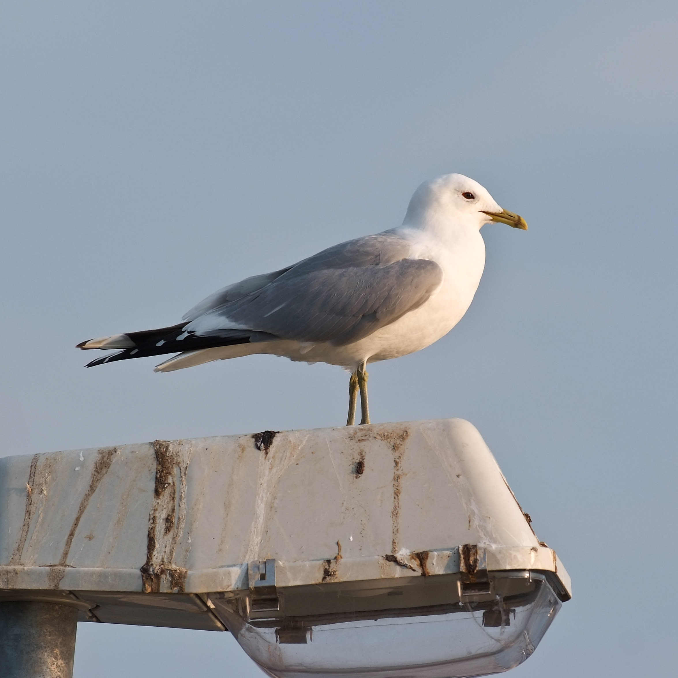 Larus canus, Maasholm, Schleswig-Holstein, Germany